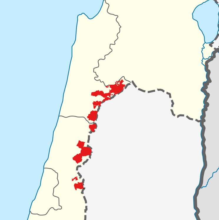 HaMeshulash map